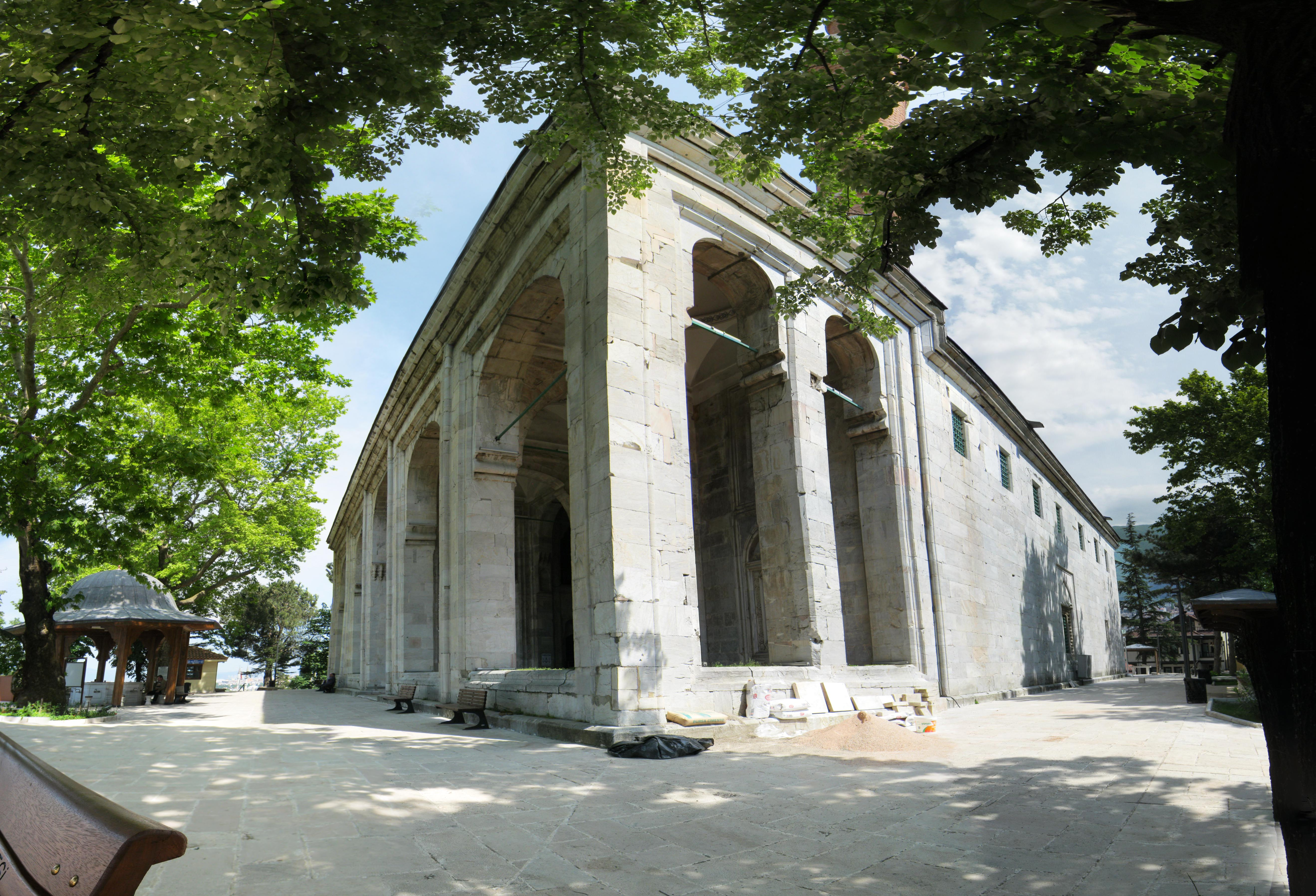 Yıldırım Bayezid Camii Bursa